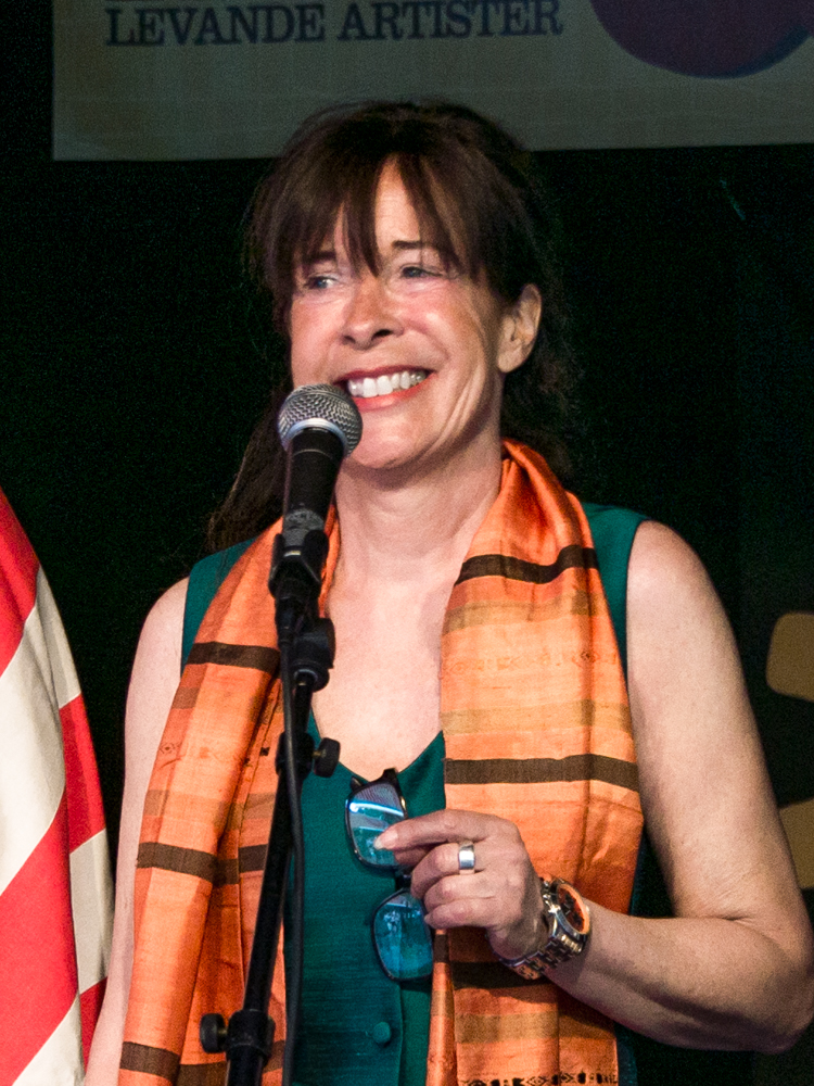 Lotta Ramel under utdelningen av KaRAMELodiktstipendiet 2017.